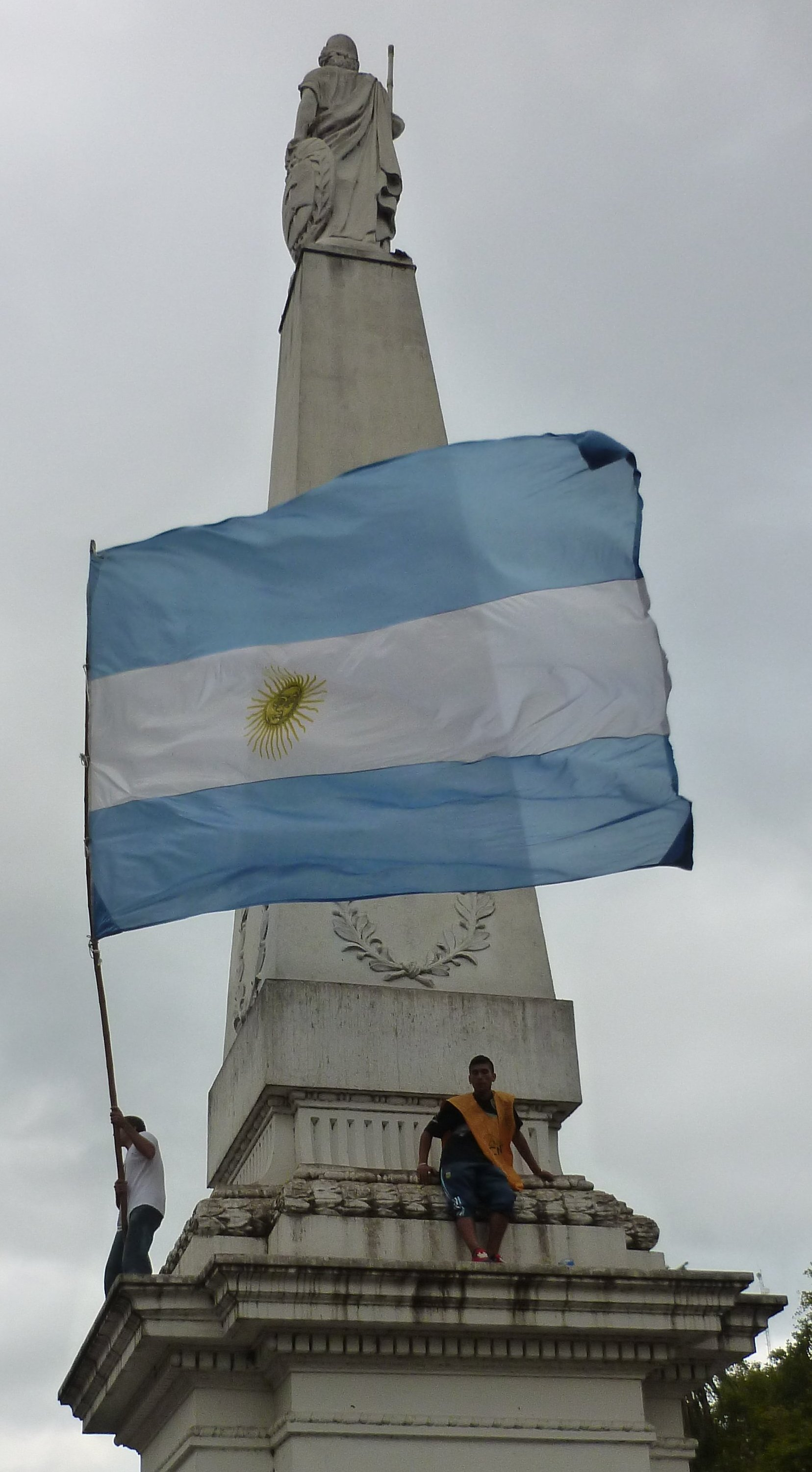 Pirámide de Mayo en Plaza de Mayo. Buenos Aires. Argentina.